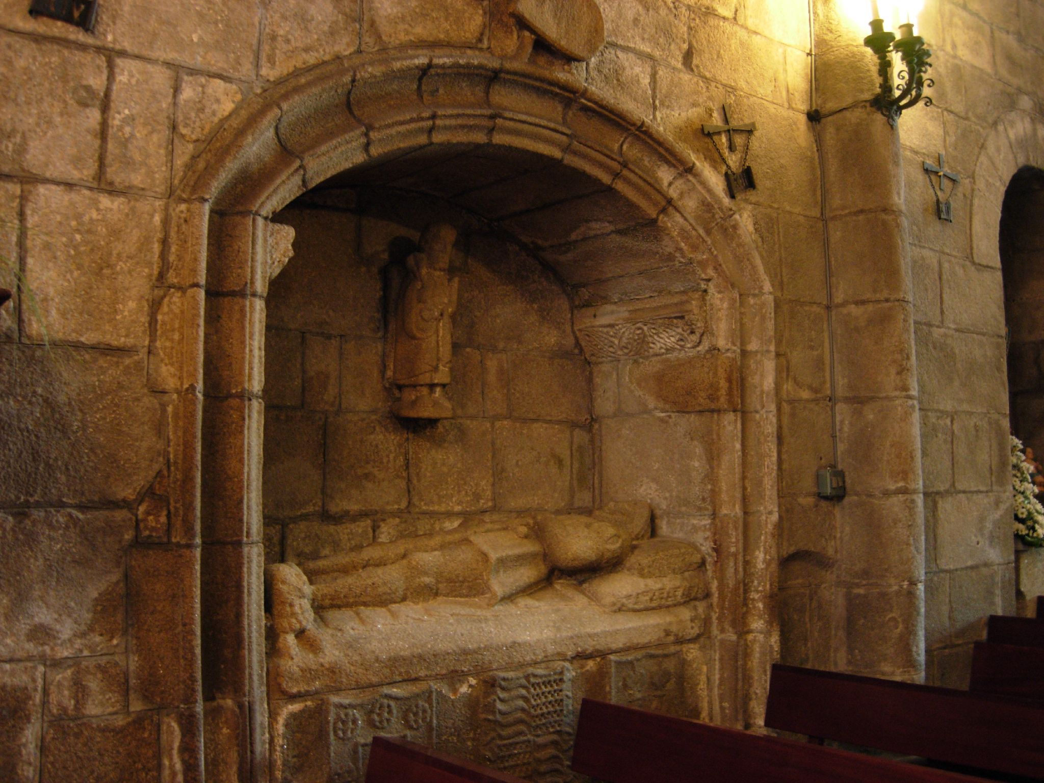 Sepulcro medieval da Igrexa de San MArtiño de Sobrán - Vilagarcía de Arousa - Pontevedra